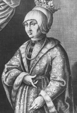 Eleonore von Schottland, Ehefrau von Sigismund von Tirol, Stich